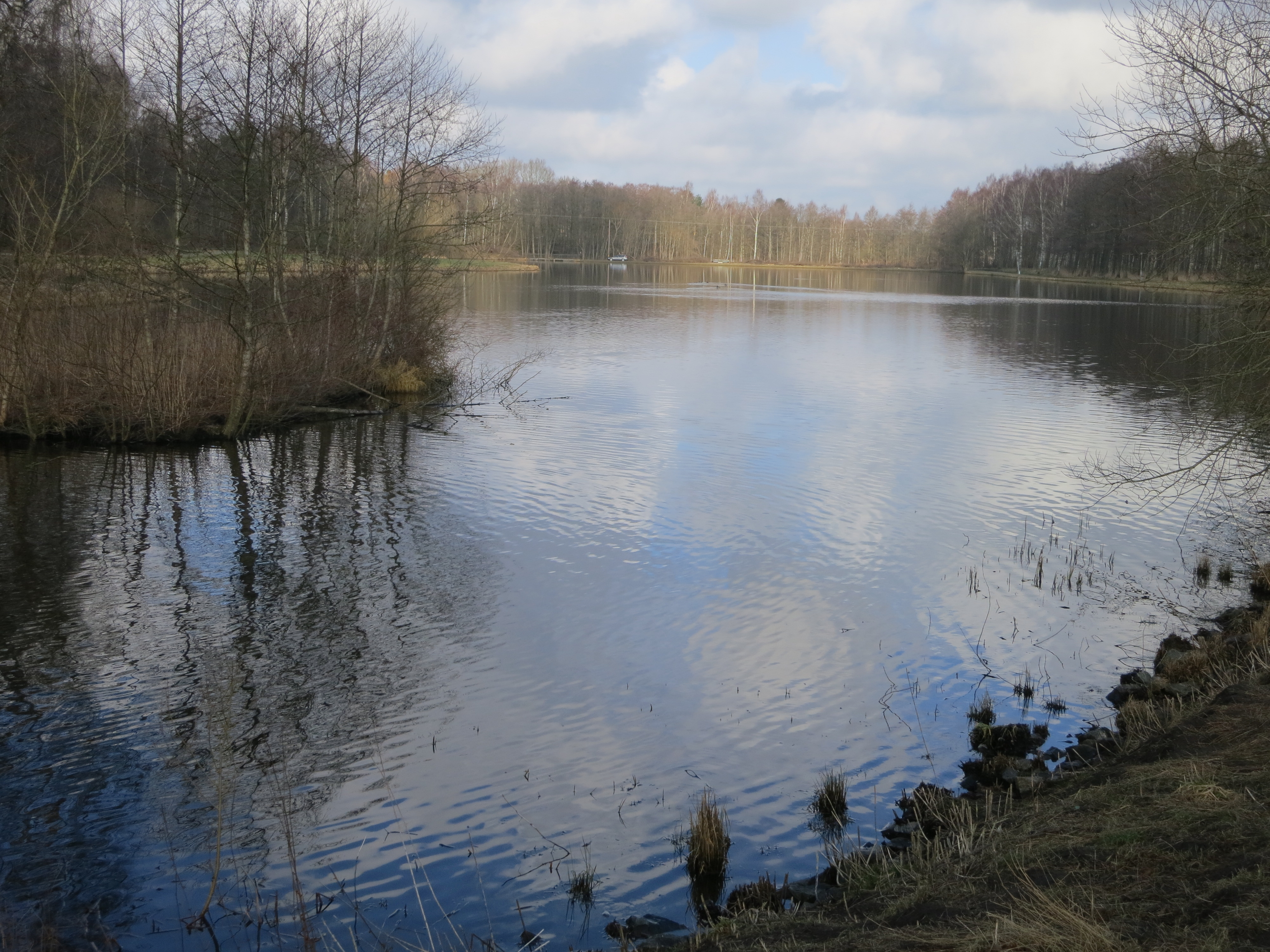 Vinslövssjön